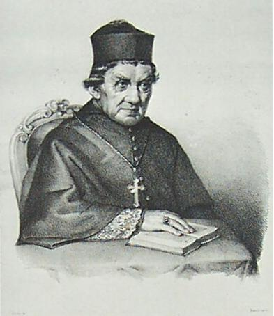 Luigi Tosi (1763-1845)